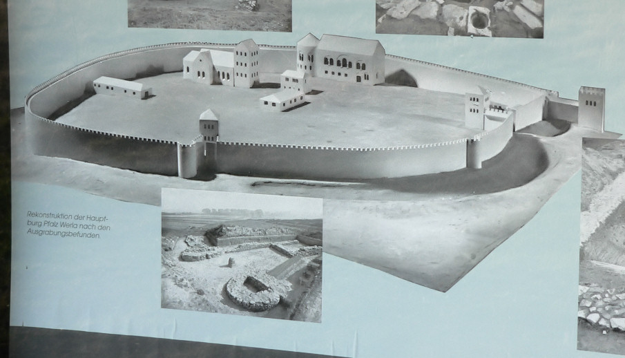 Öffentliche Schautafel für Besucher der Pfalz Werla